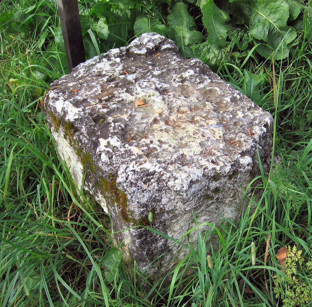 Снимок сделан 11 июля 2012 года в деревне Нижнее Калошино Старицкого района Тверской области, Россия